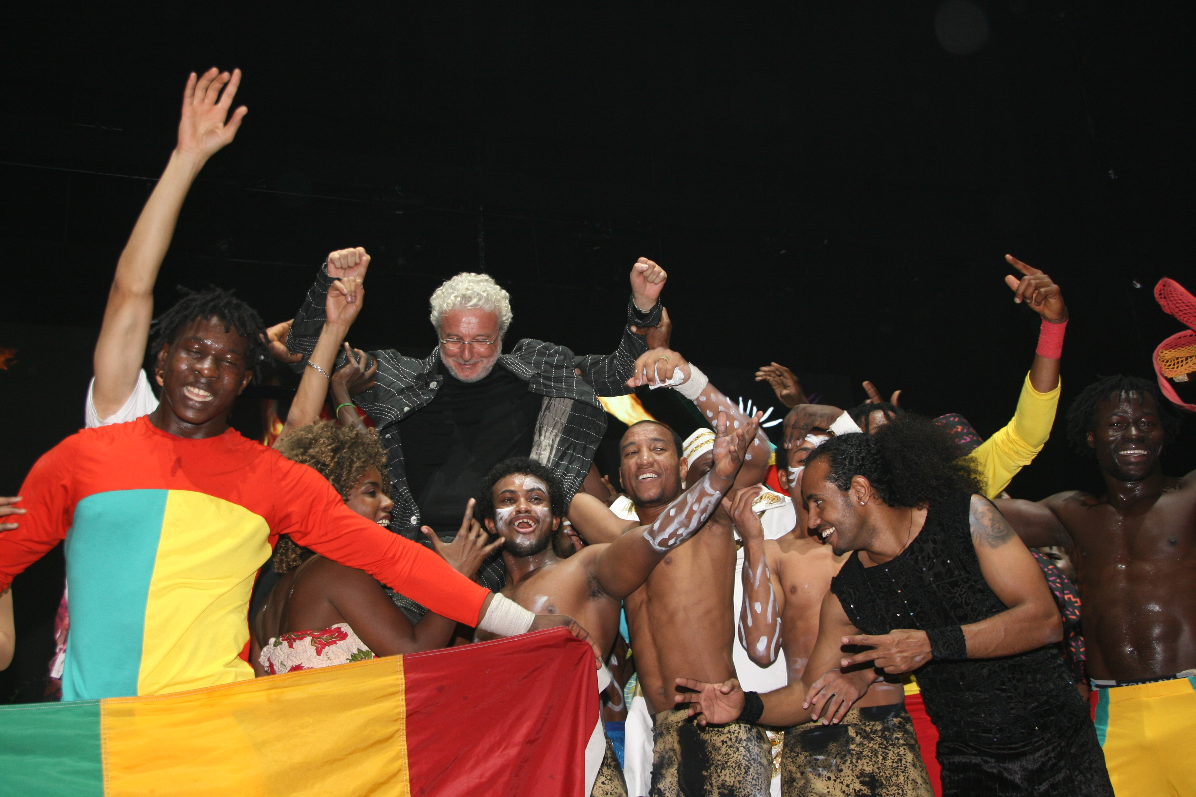 2013: André Heller mit Künstlern von AFRIKA! AFRIKA! am 22.12.2013 beim Showfinale auf der Bühne der Stadthalle in Wien, Österreich.